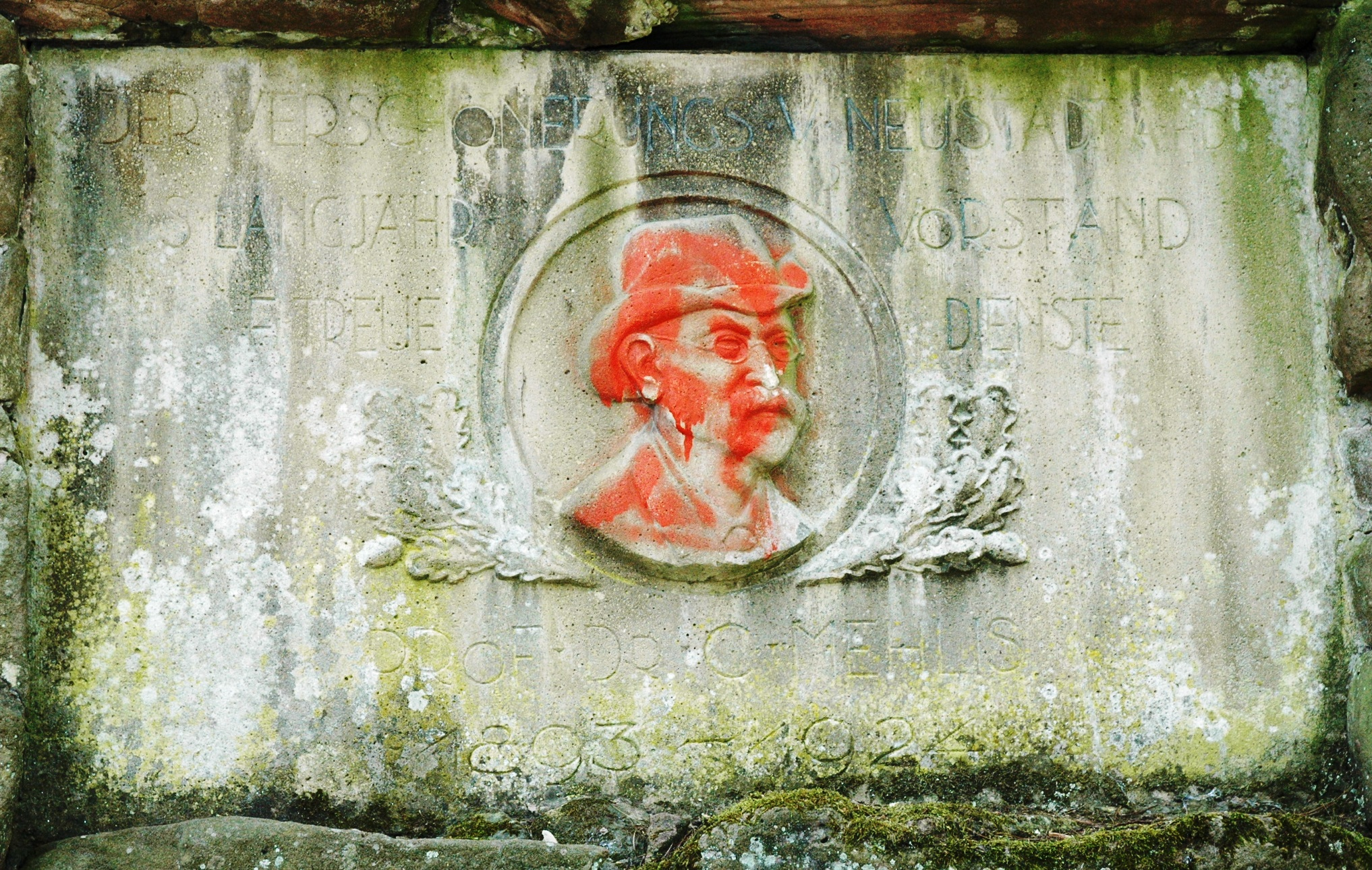 Gedenkstein von Prof. Dr. C. Mehlis